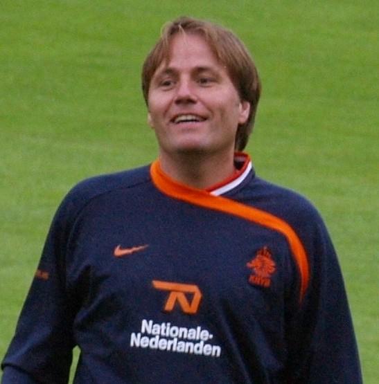 Rob Witschge